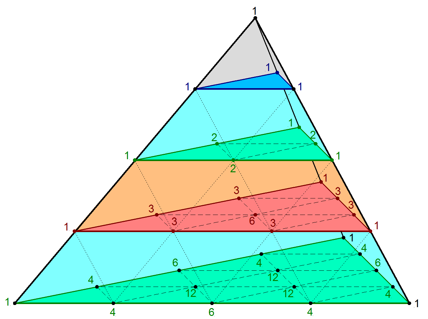 Die ersten fünf Ebenen der Pascalschen Pyramide